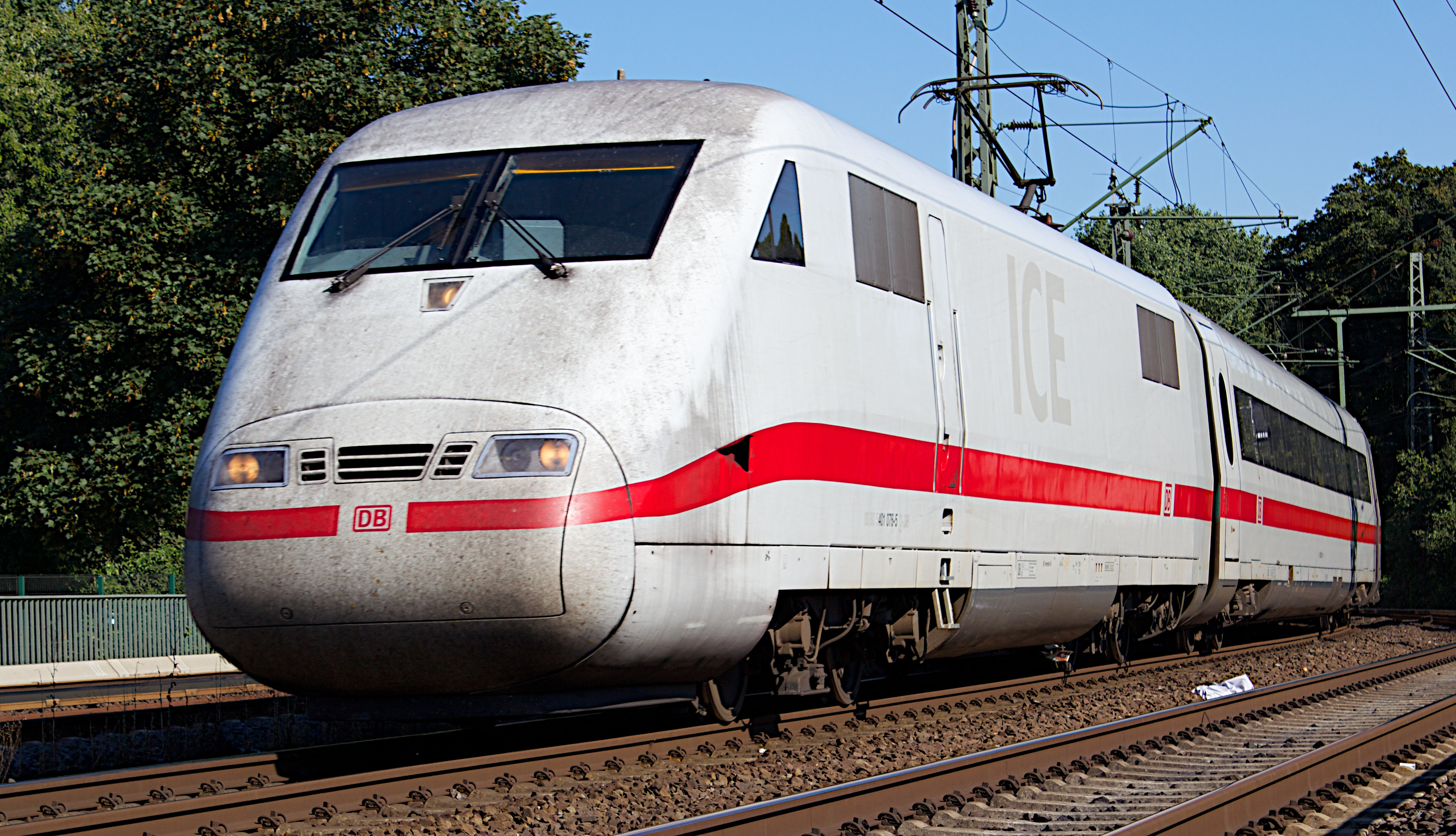 ICE zwischen Hamburg Hbf und Hamburg Dammtor.